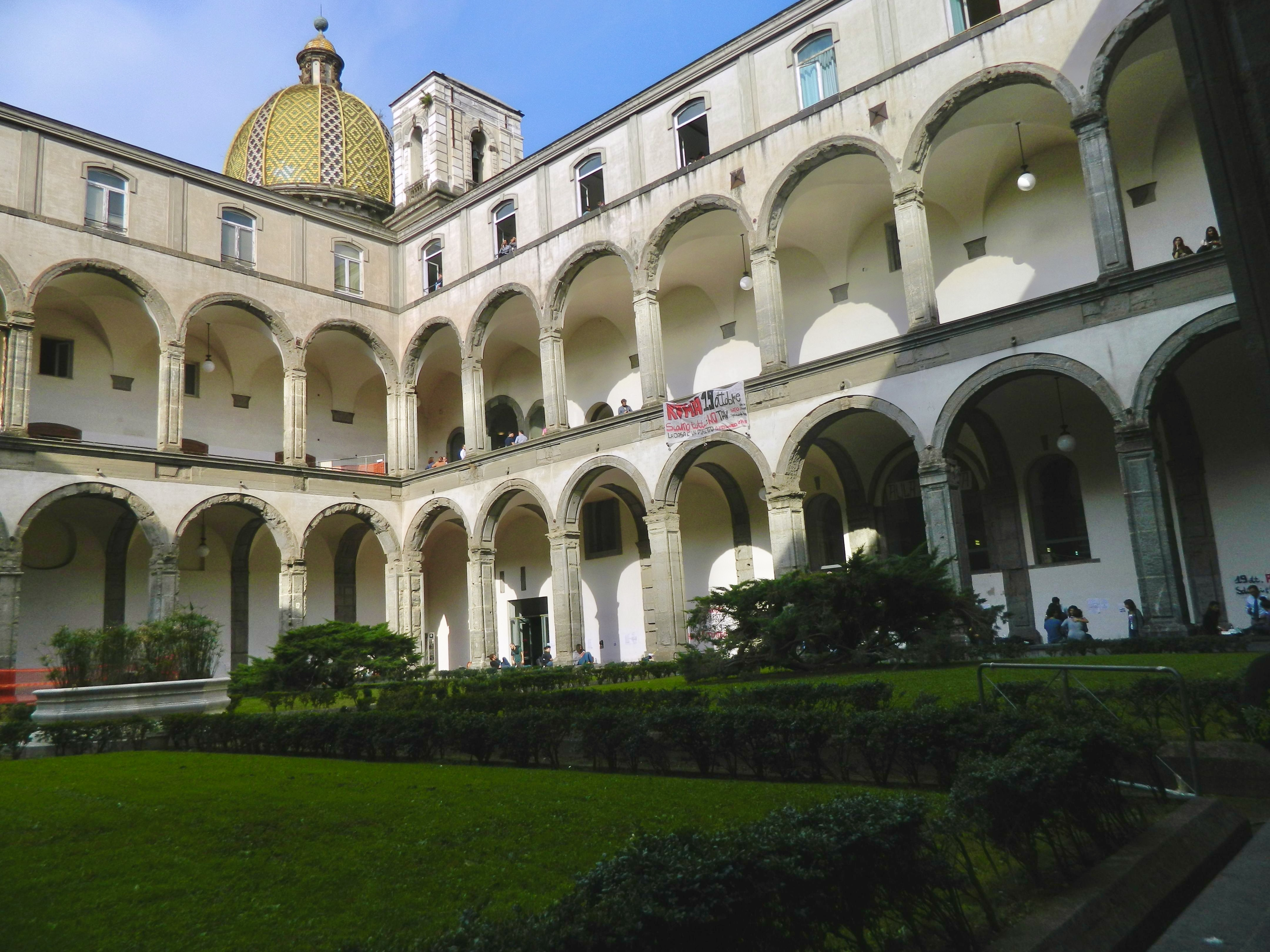 Chiostro di San Pietro Martire (Napoli)